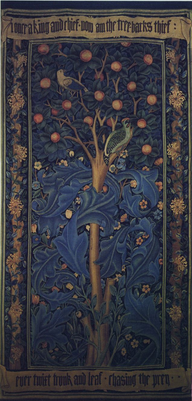 Wallpaperdesign van William Morris.